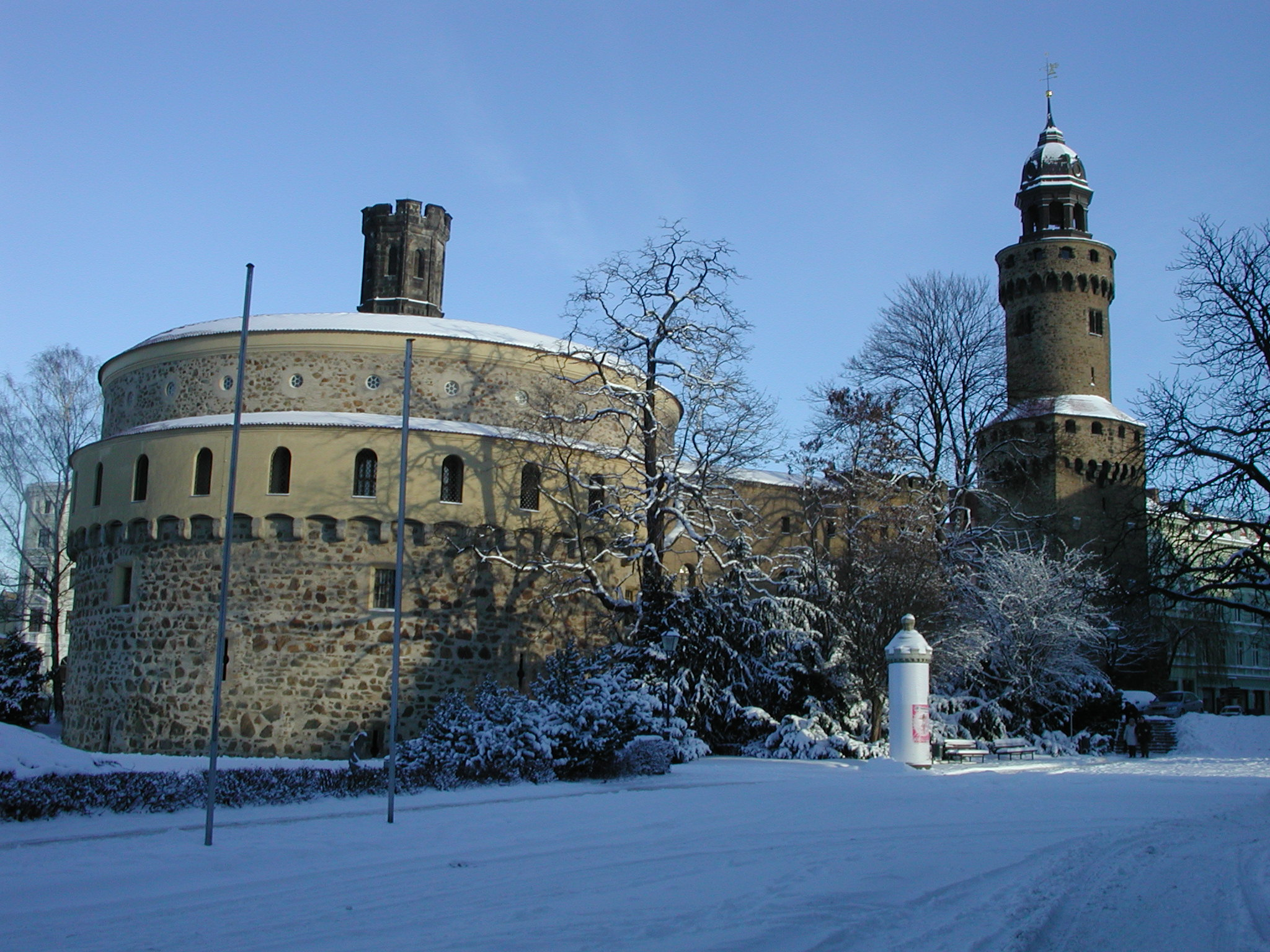 Kaisertrutz und Reichenbacher Turm